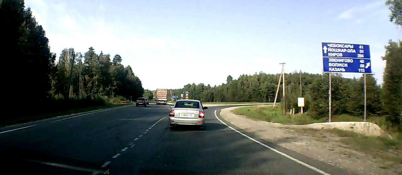 Круговое движение на автодороге